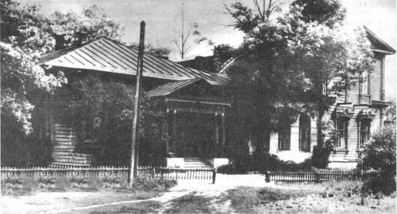 Беларуская (тарашкевіца): Ветка (Vietka). Шляхецкая сядзіба